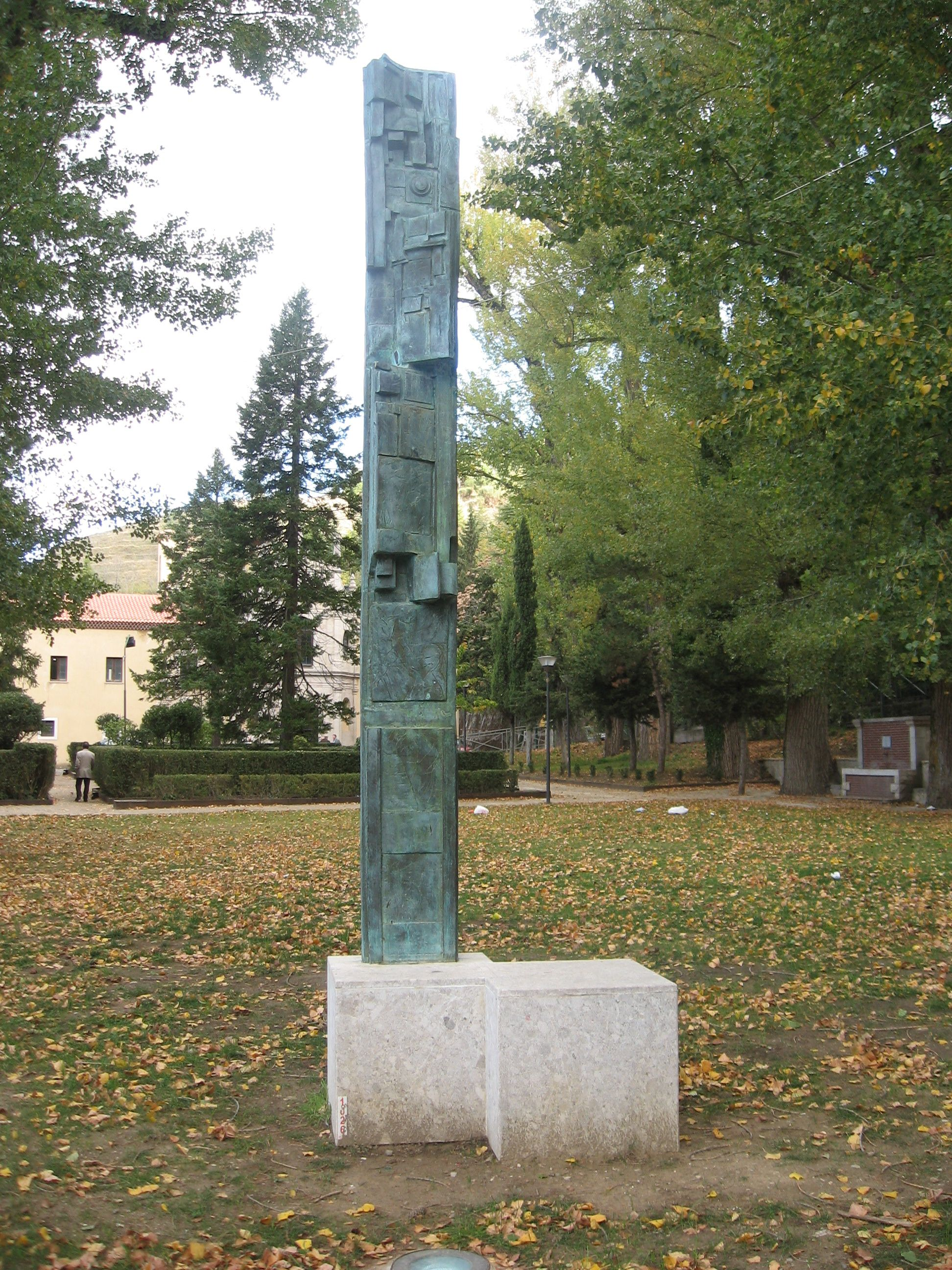 Parco del monastero